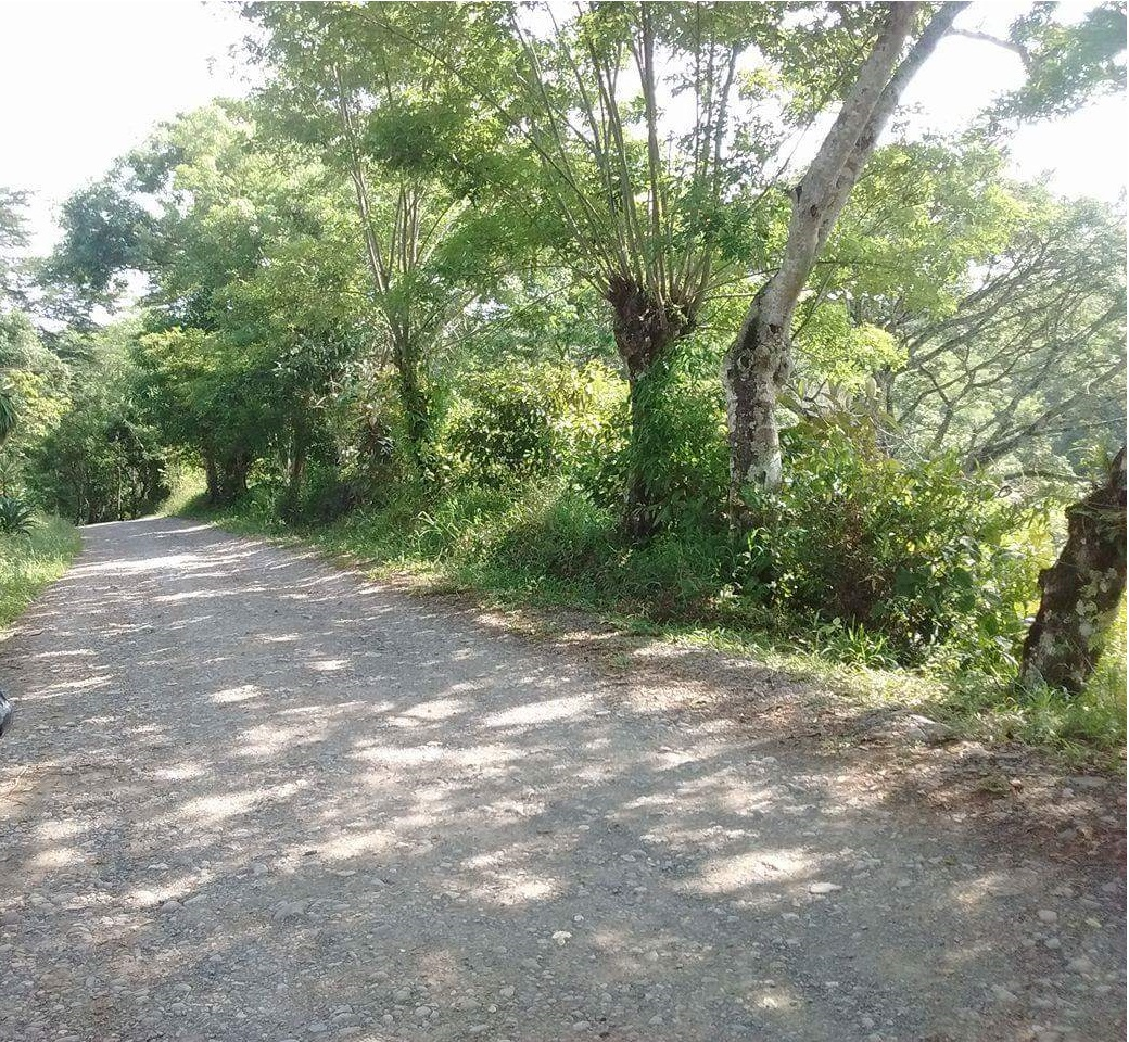 Flora de Juan de la Luz Enriquez Jesus carranza Veracruz Cocuites y otros arboles